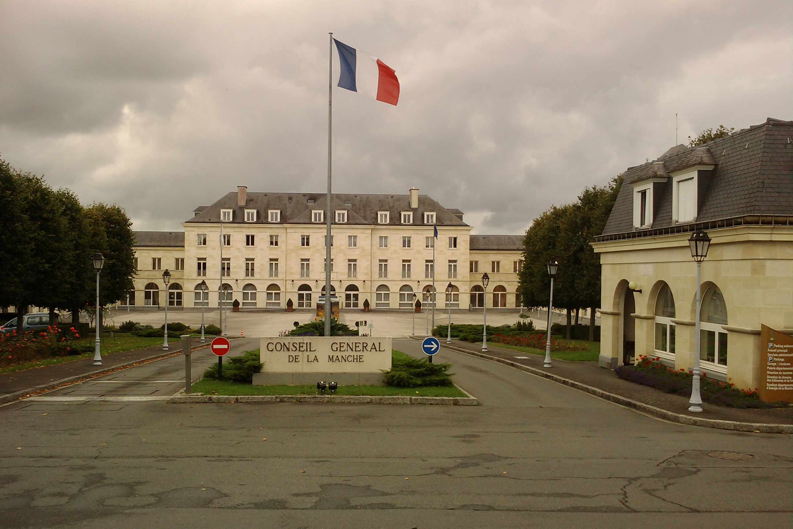 Hôtel du département du Conseil général de la Manche de Saint-Lô